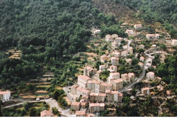 Photo Jean Meynadier